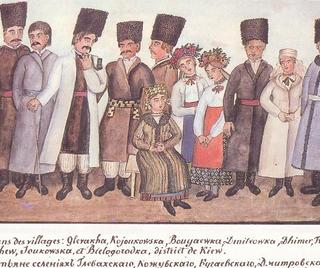 Рисунок Доминика Пьера де ля Флиза в одном их этнографических альбомов.